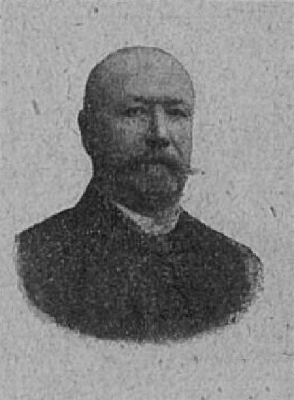 Matěj Bíba (1849-1907), rakouský a český politik